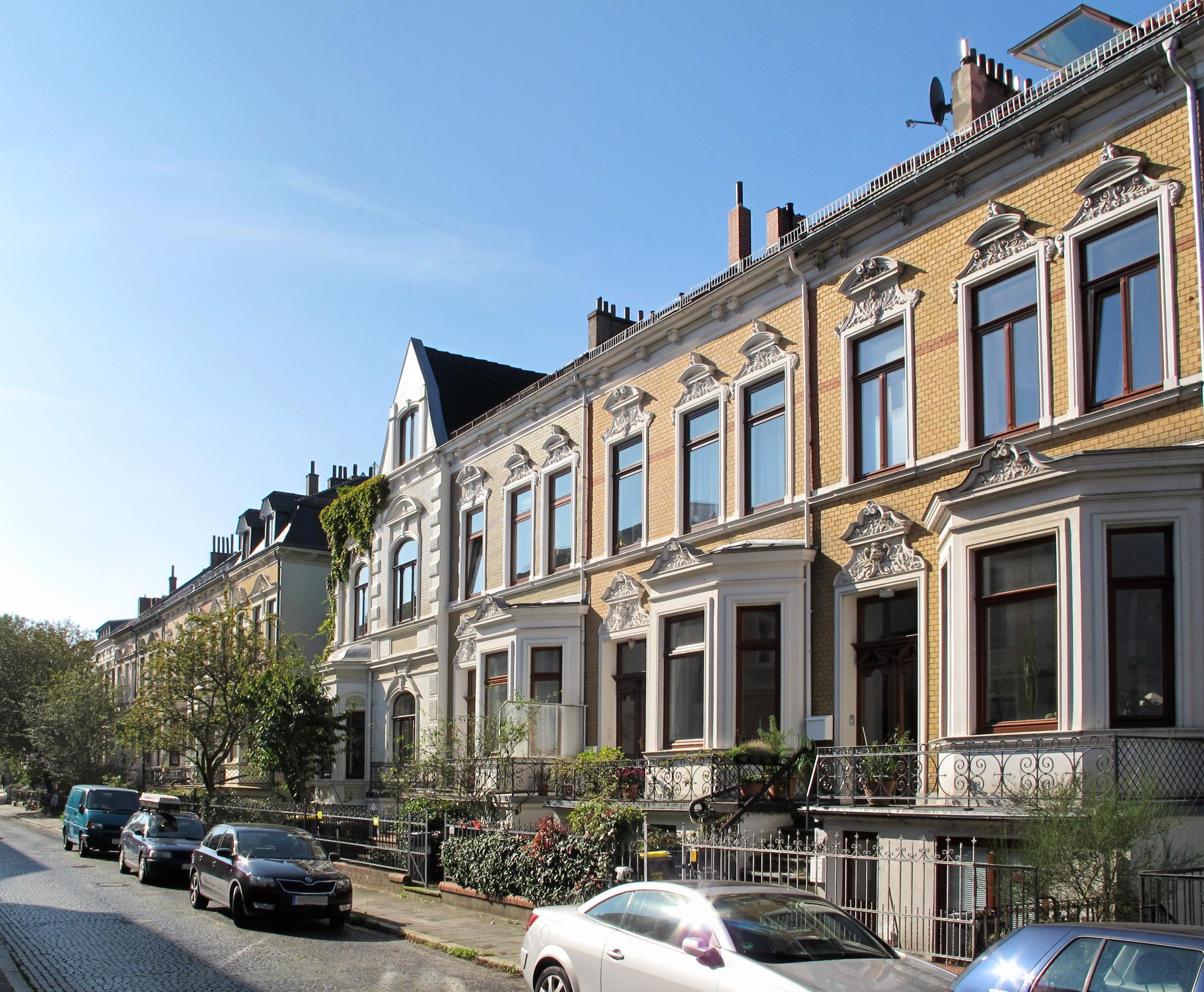 Wohnhausgruppe in Bremen, Fesenfeld 86-104 Die Denkmalgruppe ist ein geschütztes Kulturdenkmal in der Freien Hansestadt Bremen, mit der Nr. 1224 beim Landesamt für Denkmalpflege registriert.